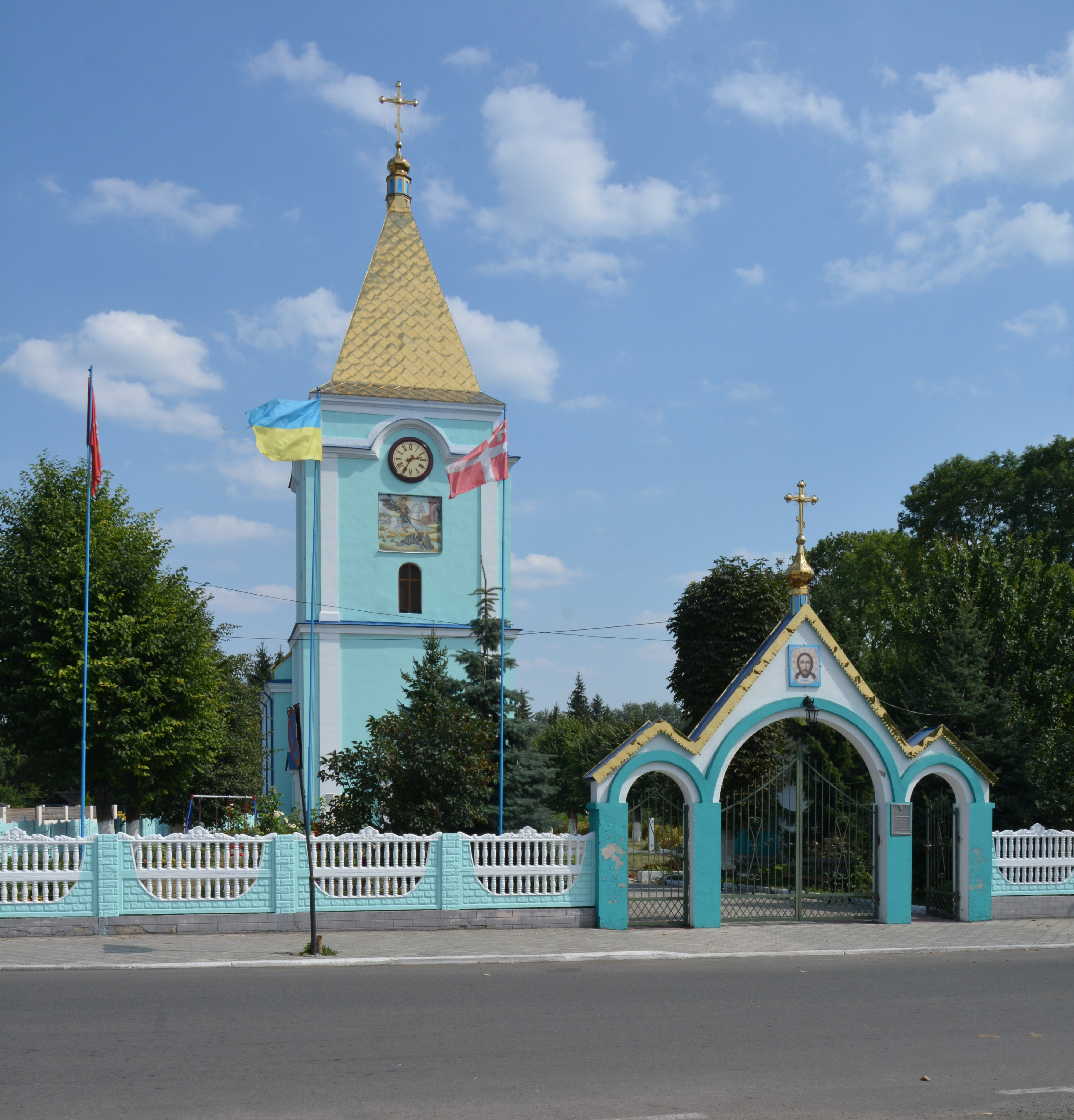 Георгіївська церква (мур.), Любомль, вул.Незалежності, 12